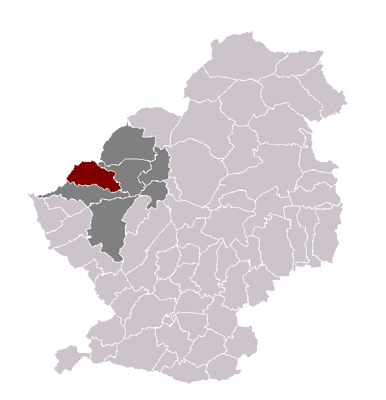 Auby dans son canton et son arrondissement